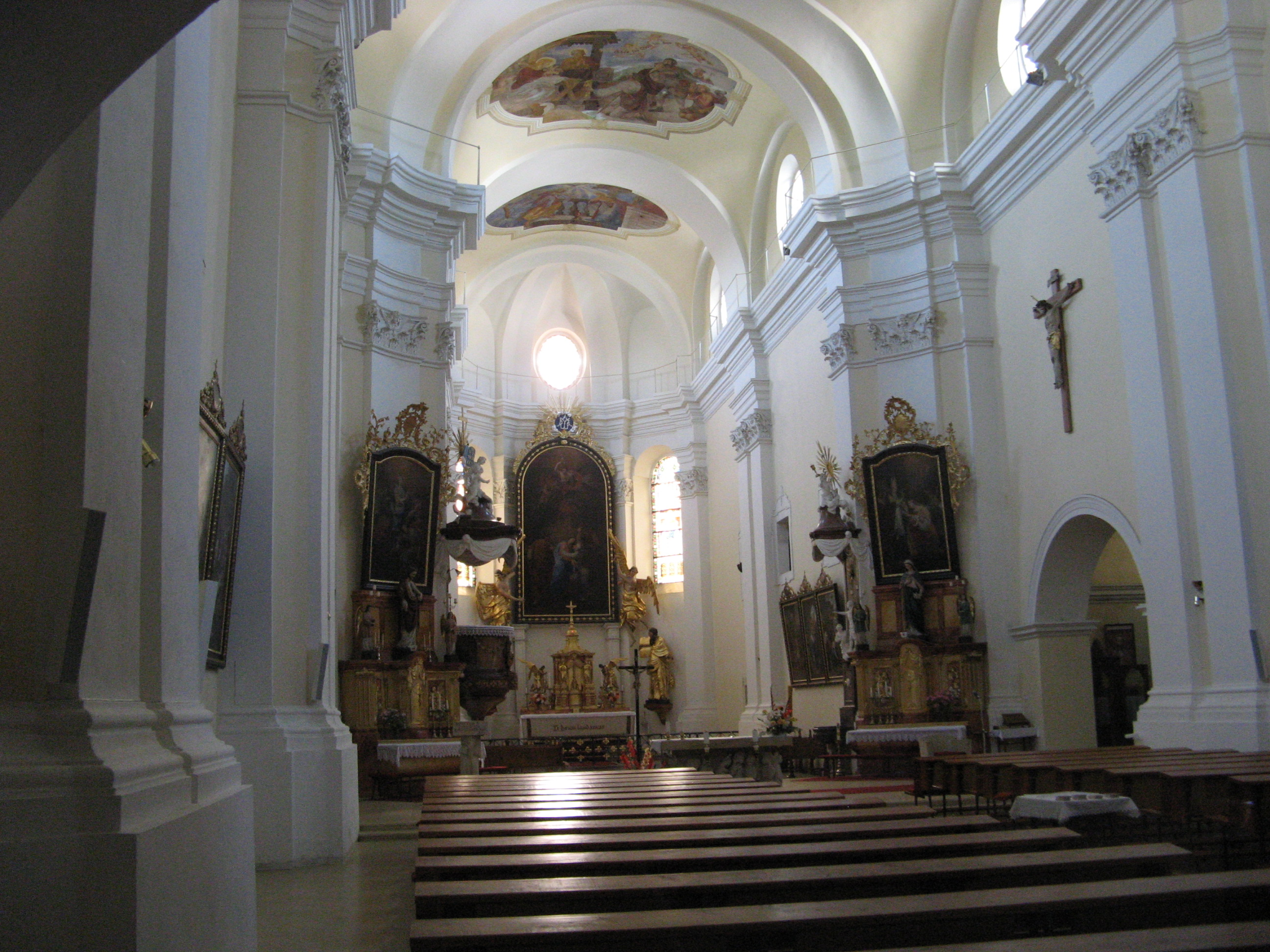 Kostel Navštívení Panny Marie (Svitavy), vnitřek, Czech Republic